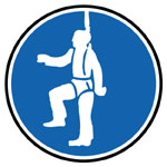 Pictogramme "Obligation du port de dispositif anti-chute"